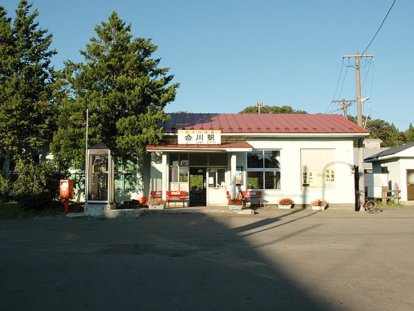 Aikawa Station, on the Akita Nairiku Jūkan Railway Akita Nairiku Line, Kitaakita, Akita, Japan